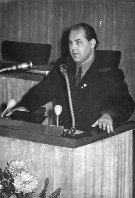 Illus/Quaschinsky 1.11.51 13. und 14. Sitzung der Volkskammer Die Volkskammer der DDR trat am 31.10.51 und 1.11.51 zu ihrer 13. und 14. Sitzung zusammen, um u.a. über das "Gesetz über den Fünfjahresplan zur Entwicklung der Volkswirtschaft der Deutschen Demokratischen Republik", den "Rechenschaftsbericht der Regierung über die Einnahmen der Republik und ihre Verwendung für das Rechnungsjahr 1950" und das "Gesetz über die Deutsche Notenbank" zu beraten. UBz: Für den FDGB sprach der Abgeordnete Rudolf Kirchner.